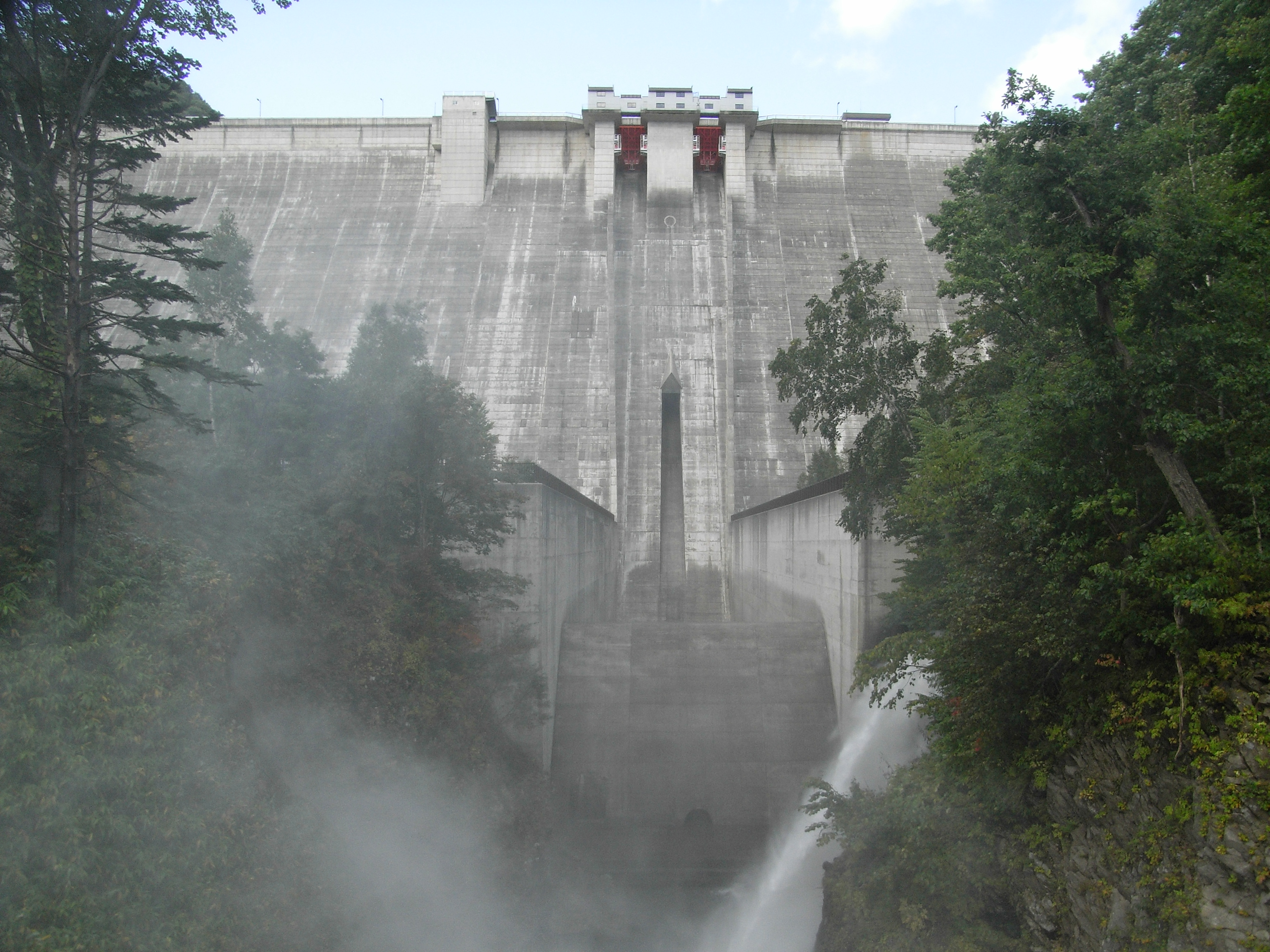 Dam